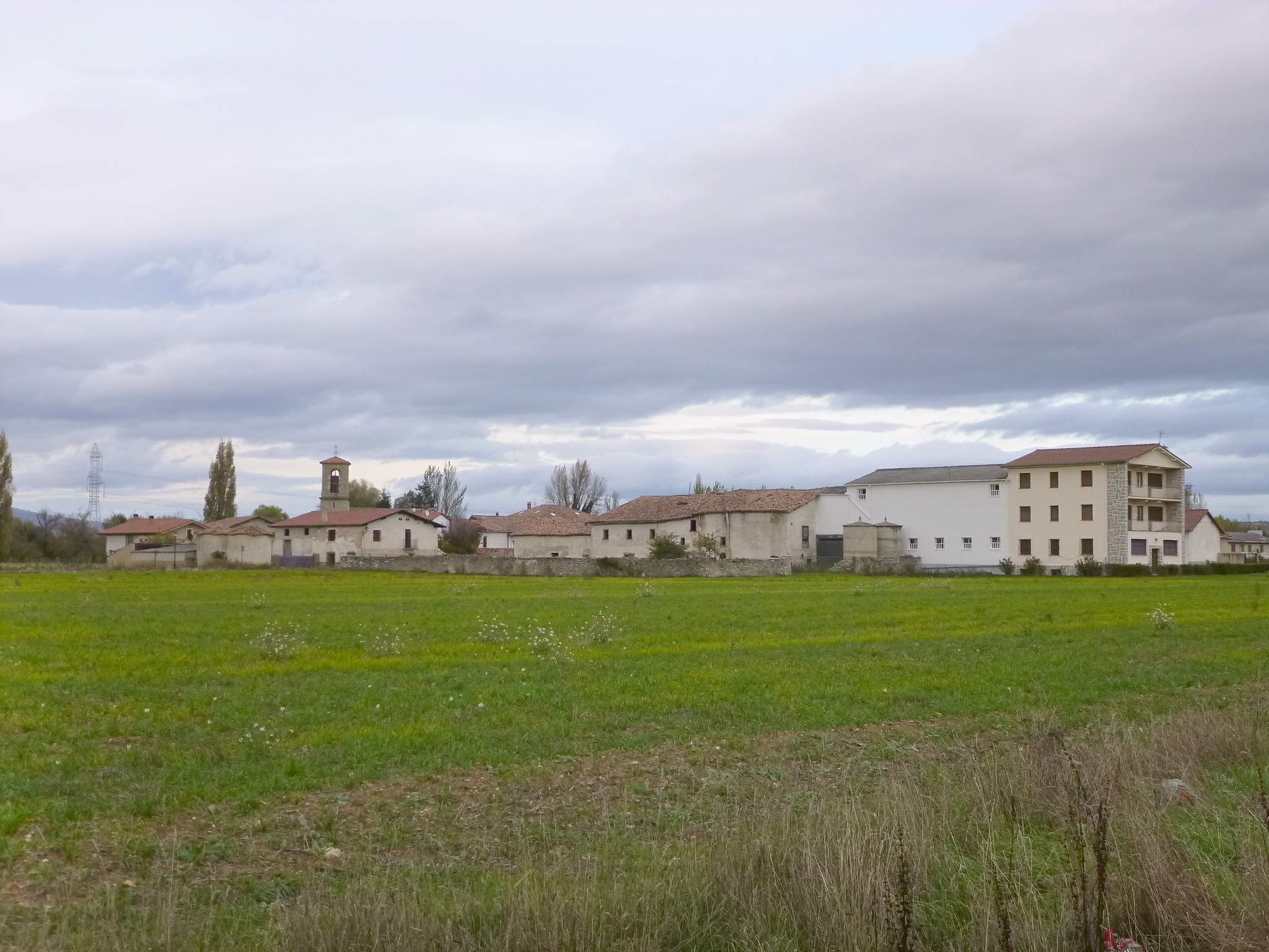 Gobeo (Vitoria, Álava)